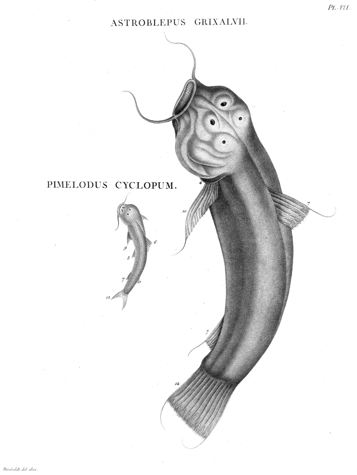 Astroblepus grixalvii Humboldt, Pimelodus cyclopum (=Astroblepus cyclopus) Humboldt.